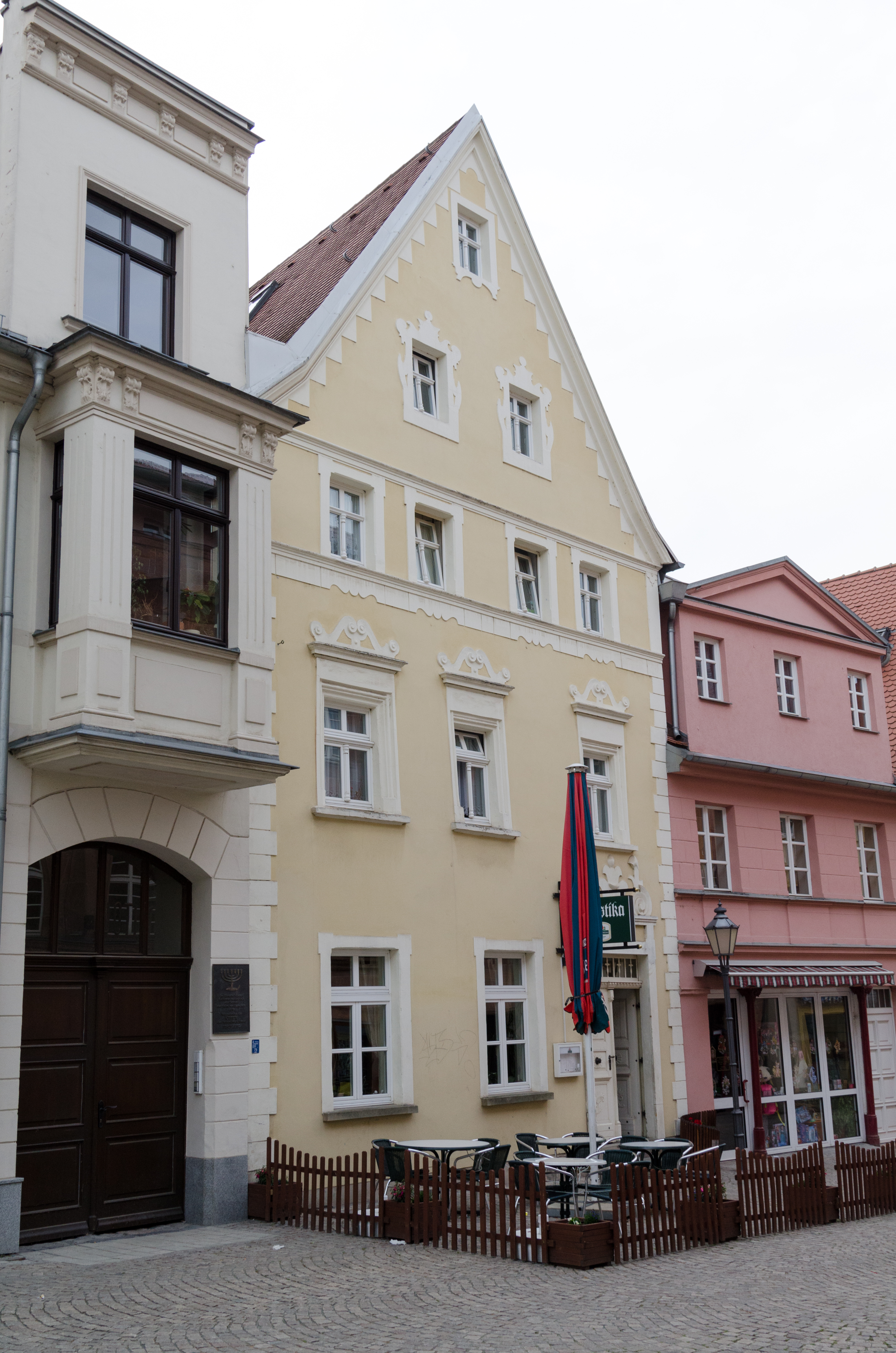 Zeitz, Judenstraße 7